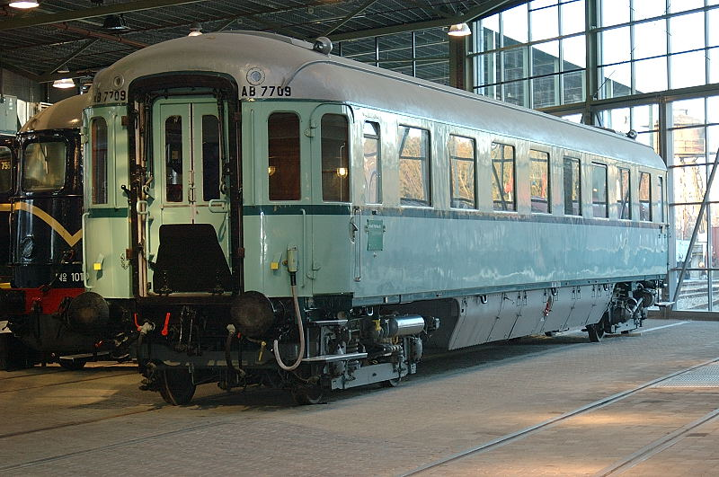 Plan D rijtuig AB7709 in het spoorwegmuseum